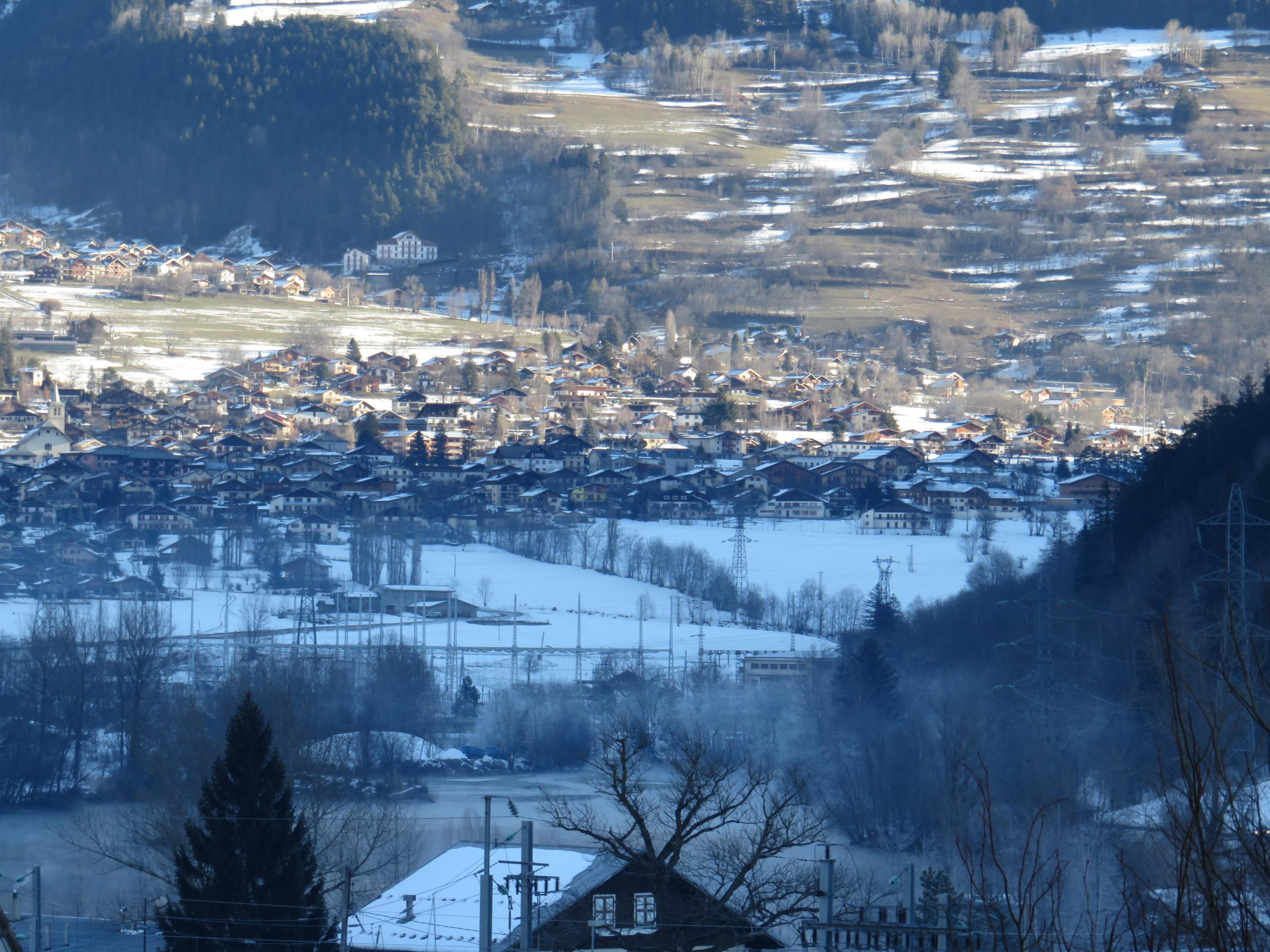 Séez vu depuis la gare de Bourg-Saint-Maurice